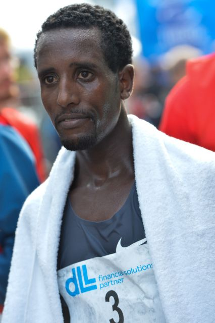 После победы на Эйндховенском марафоне 2014 года